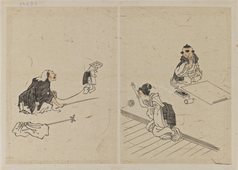 Drawings